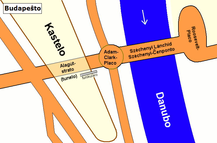 Priskribo